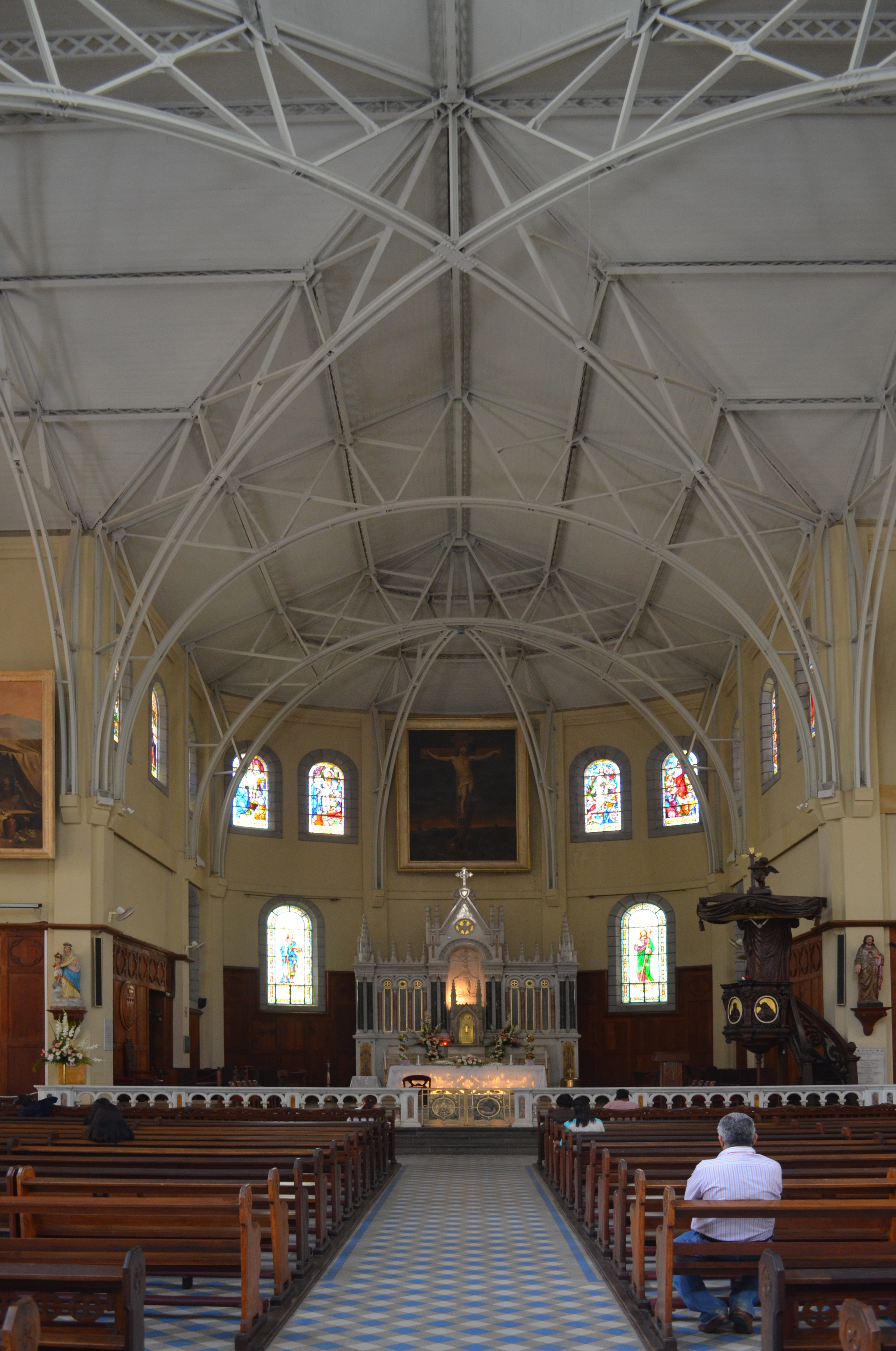 Port Louis, Saint Louis Cathedral, interieur